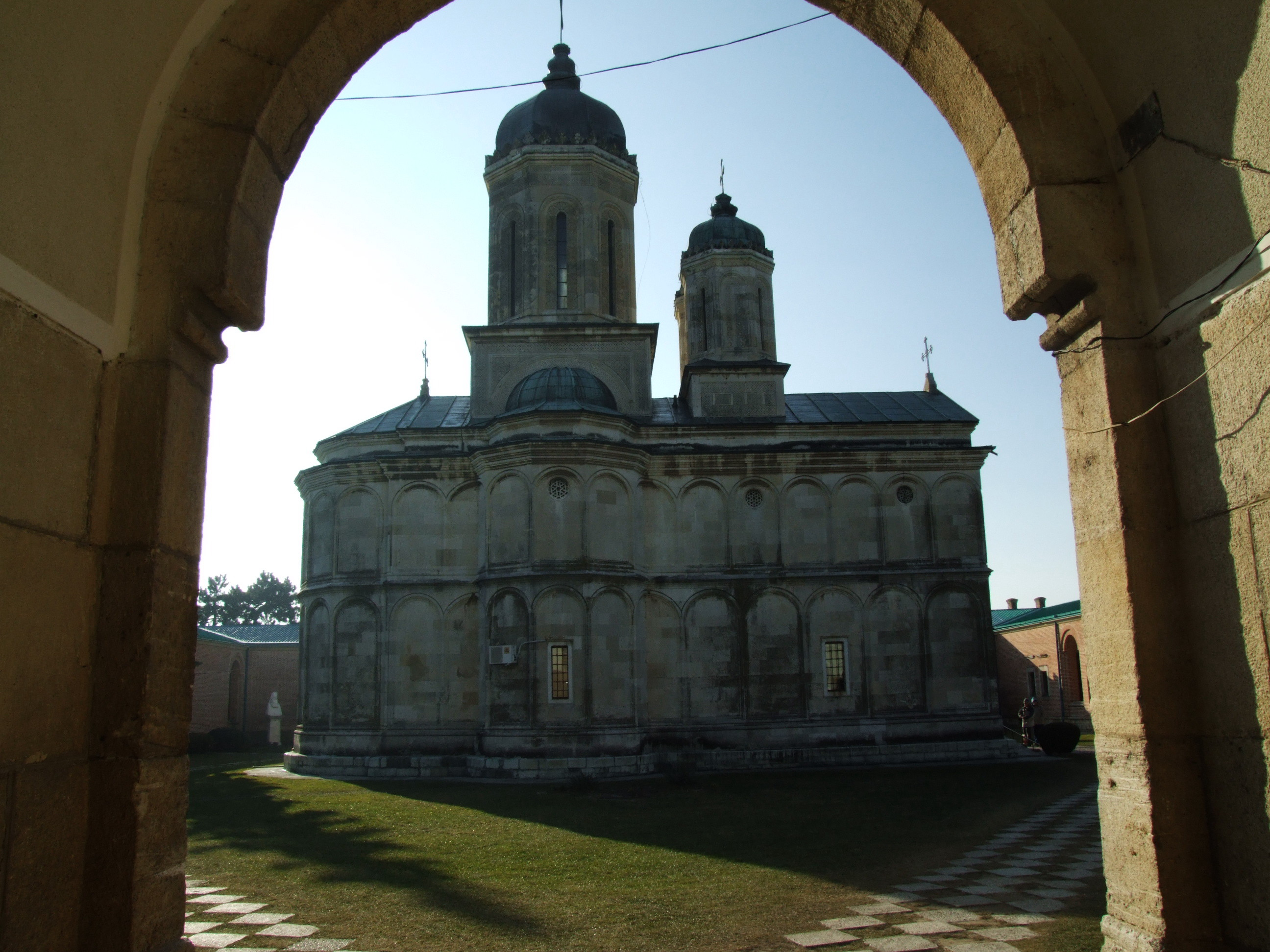 Dealu Cloister